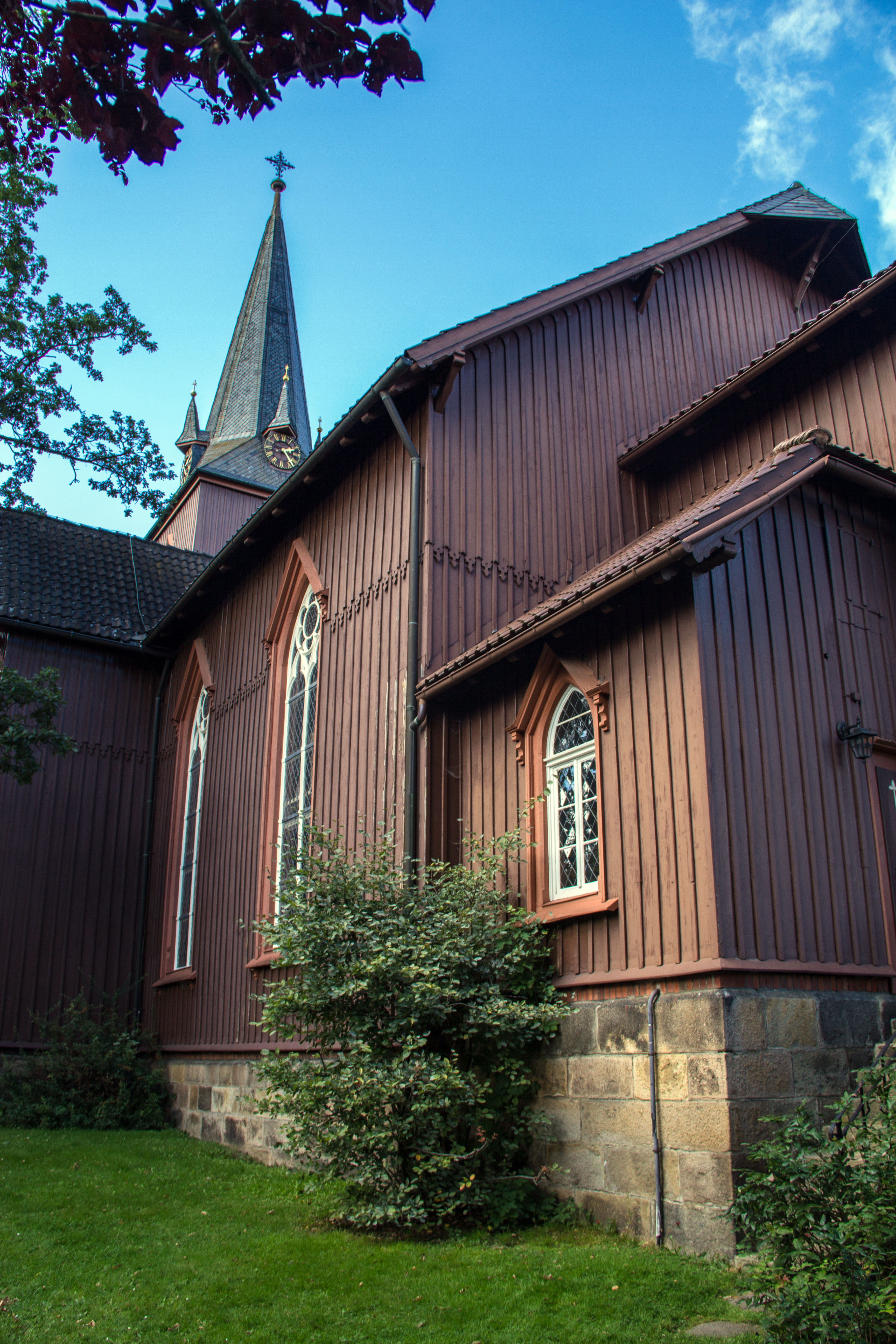 Trinitatiskirche, Braunlage